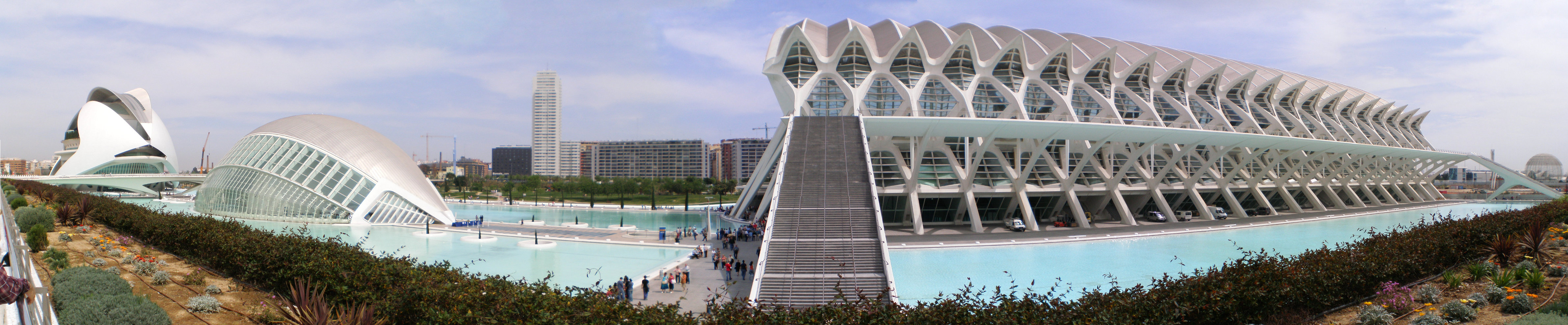 Panorámica de la ciudad de las artes y las ciencias (Valencia), realizada con cinco fotografías tomadas el 21 de Abril del año 2007. Todo el proceso ha sido llevado a cabo bajo sistemas GNU/Linux, con los programas Hugin y GIMP.